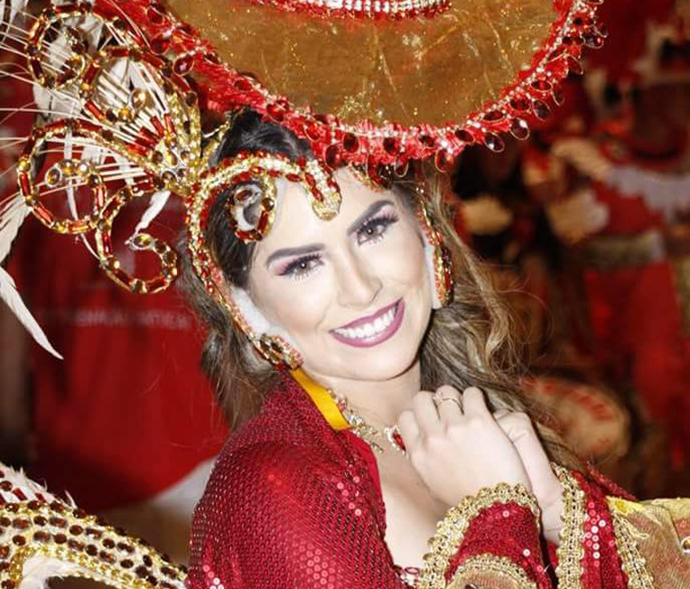 Sinhazinha